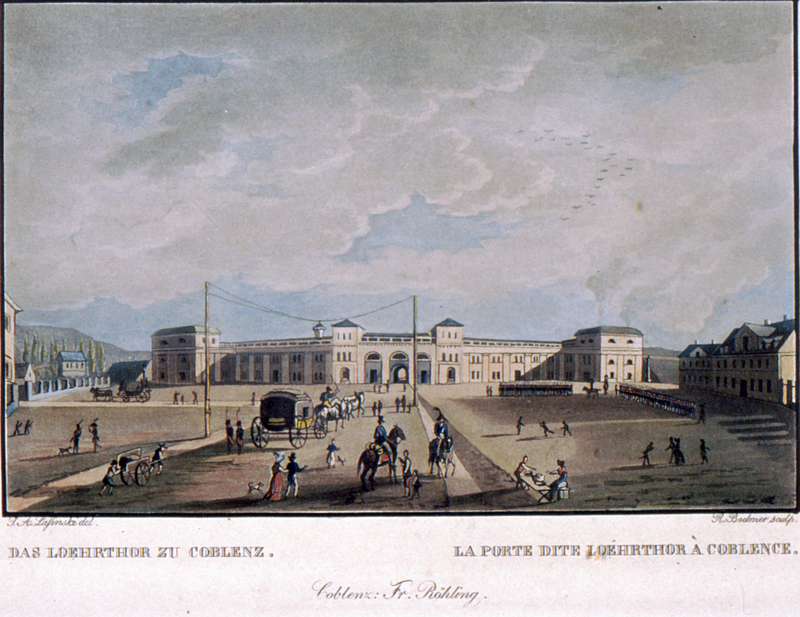 Löhrtor